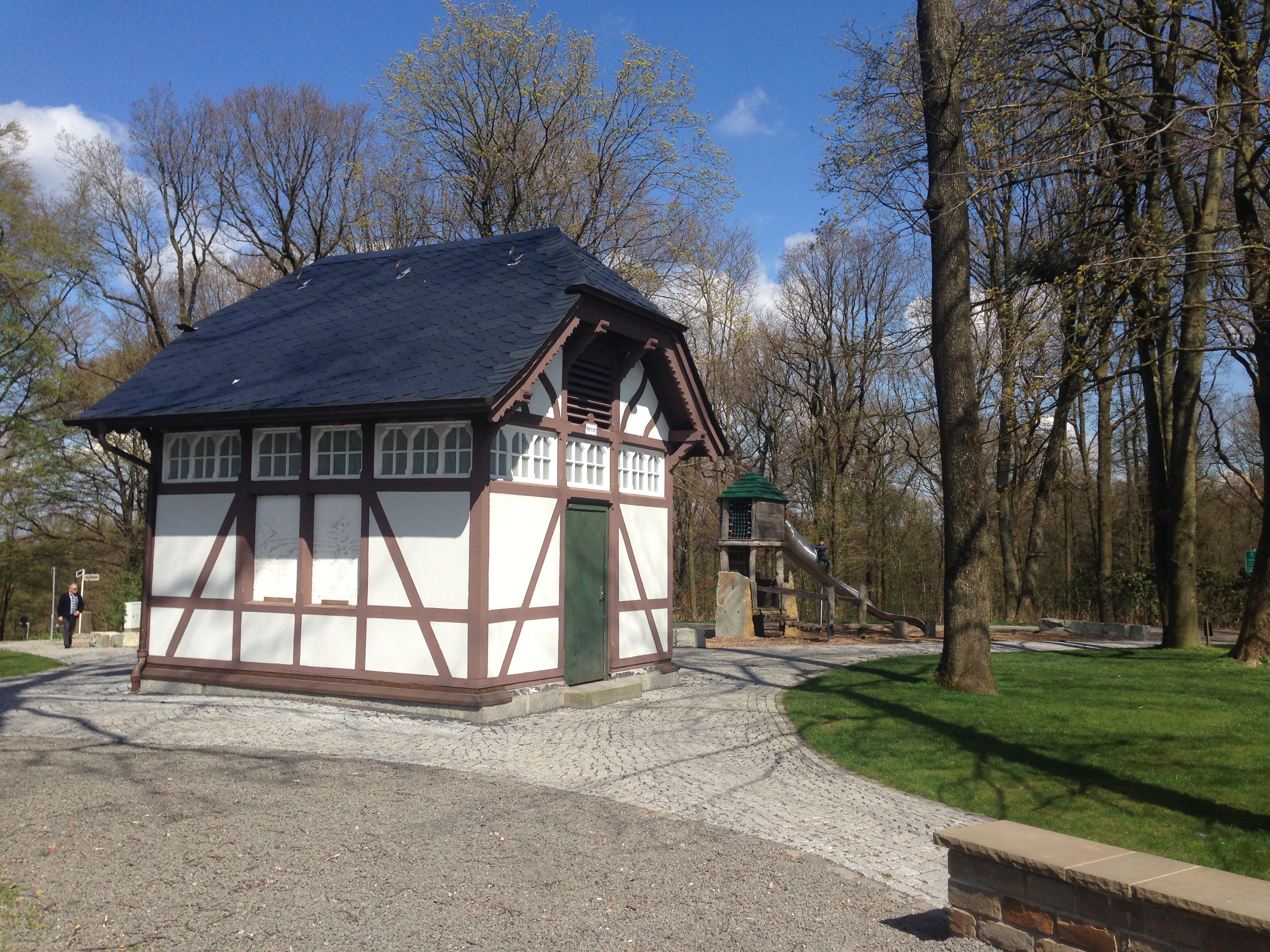 Das renovierte Toilettenhäuschen Eisenlohrstraße in den Barmer Anlagen, April 2016.